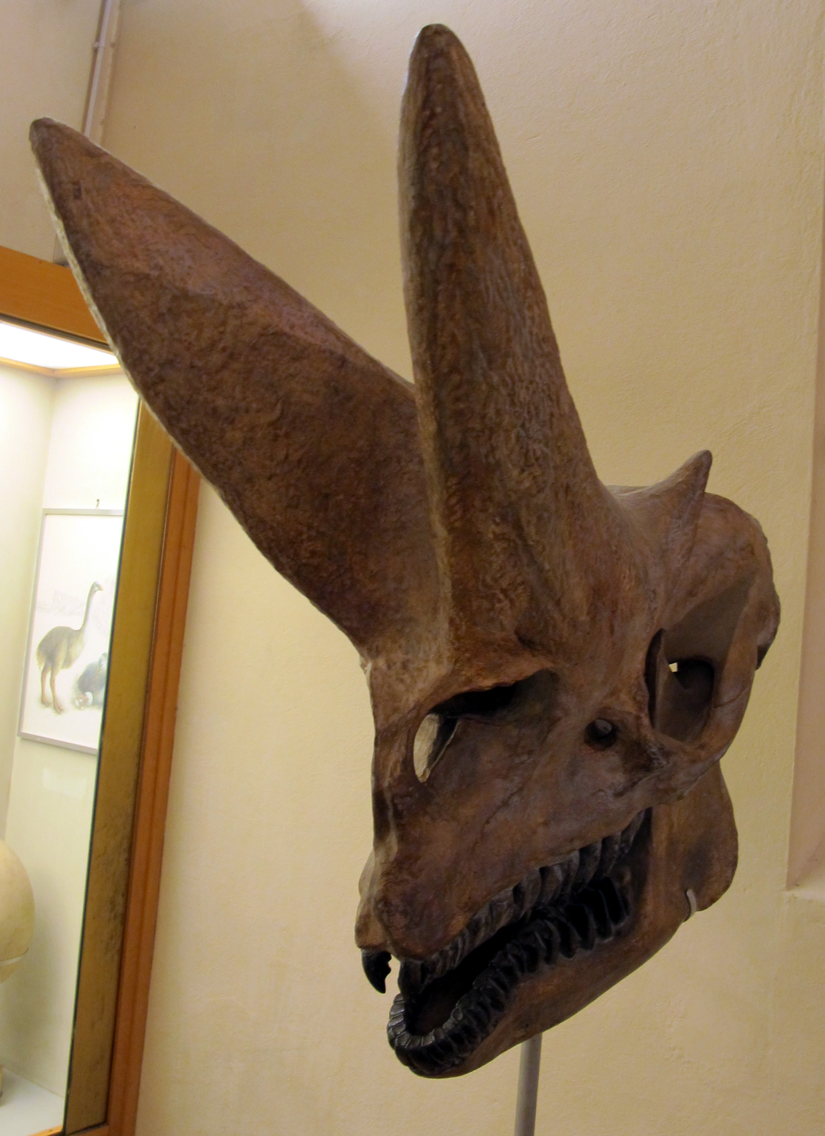 Museo di paleologia, cranio di arsinoitherium zitteli, da fayoum, egitto